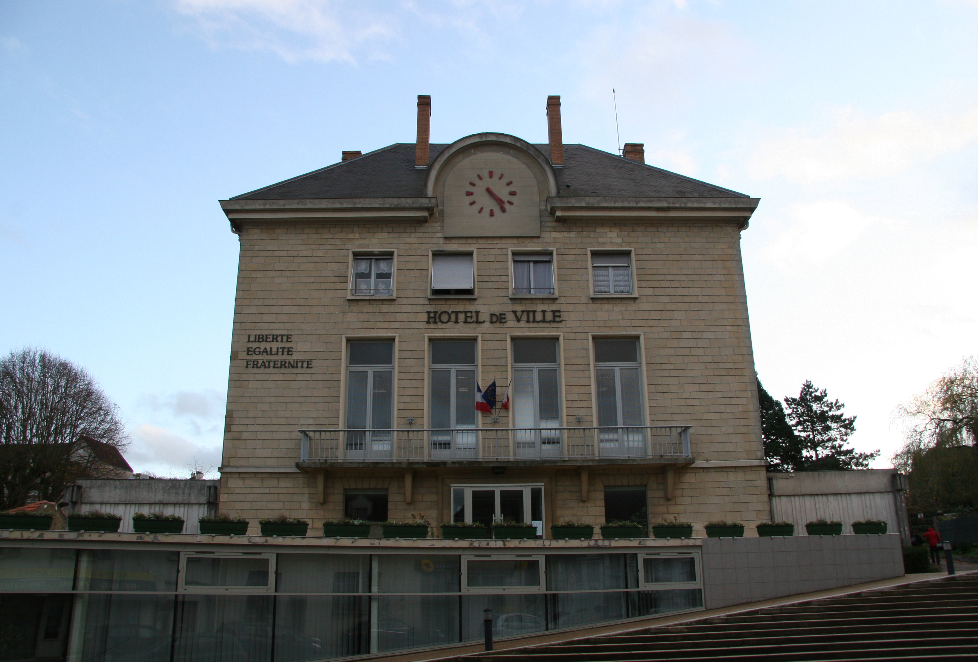 Hôtel de ville de Bures-sur-Yvette.